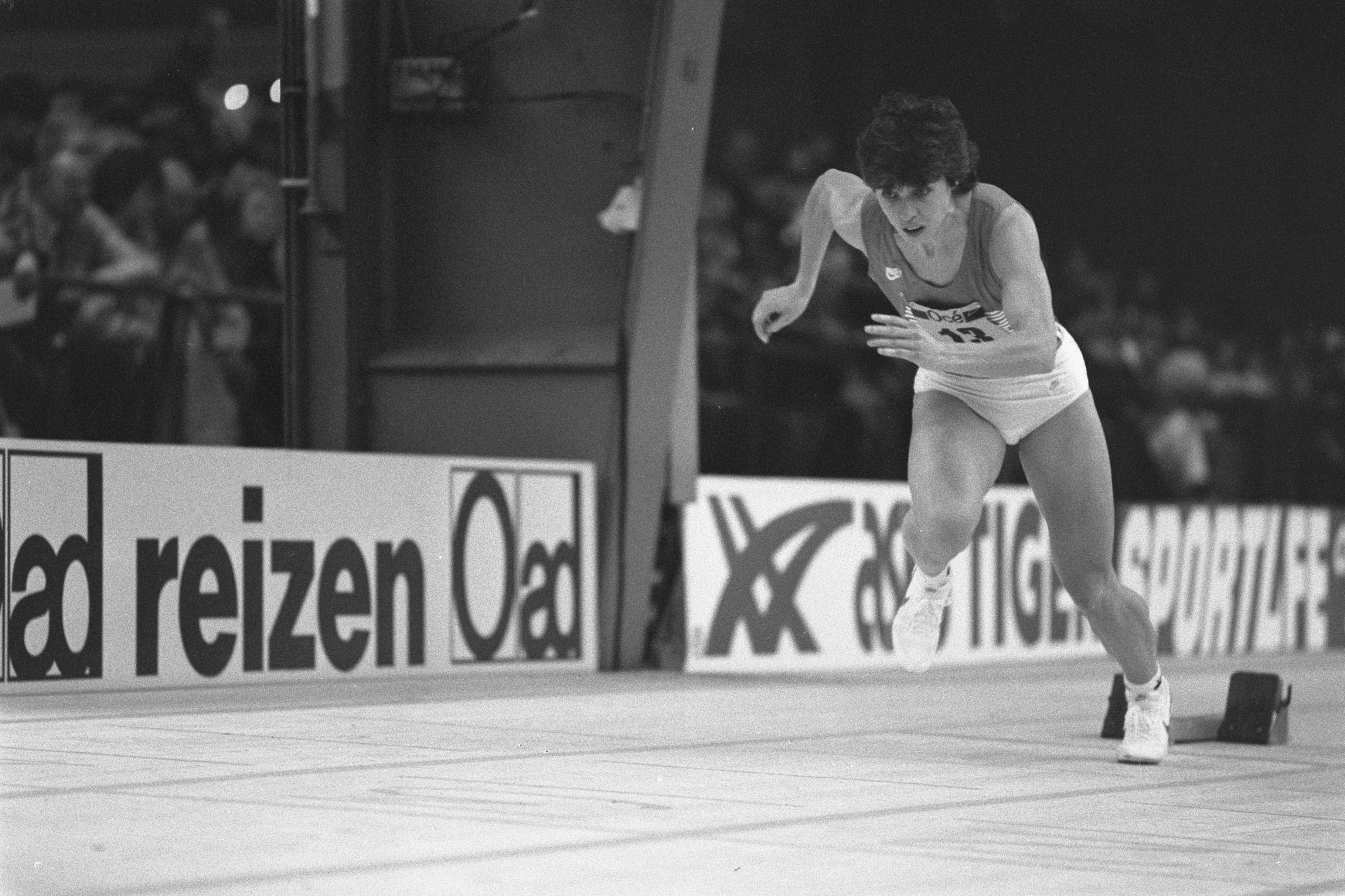 Collectie / Archief : Fotocollectie Anefo Reportage / Serie : [ onbekend ] Beschrijving : NK Indoor Atletiek in Den Haag ; Els Vader in winnende finale op 200 meter Datum : 8 februari 1987 Locatie : Den Haag, Zuid-Holland Trefwoorden : atletiek Persoonsnaam : Els Vader Fotograaf : Croes, Rob C. / Anefo Auteursrechthebbende : Nationaal Archief Materiaalsoort : Negatief (zwart/wit) Nummer archiefinventaris : bekijk toegang 2.24.01.05 Bestanddeelnummer : 933-8852